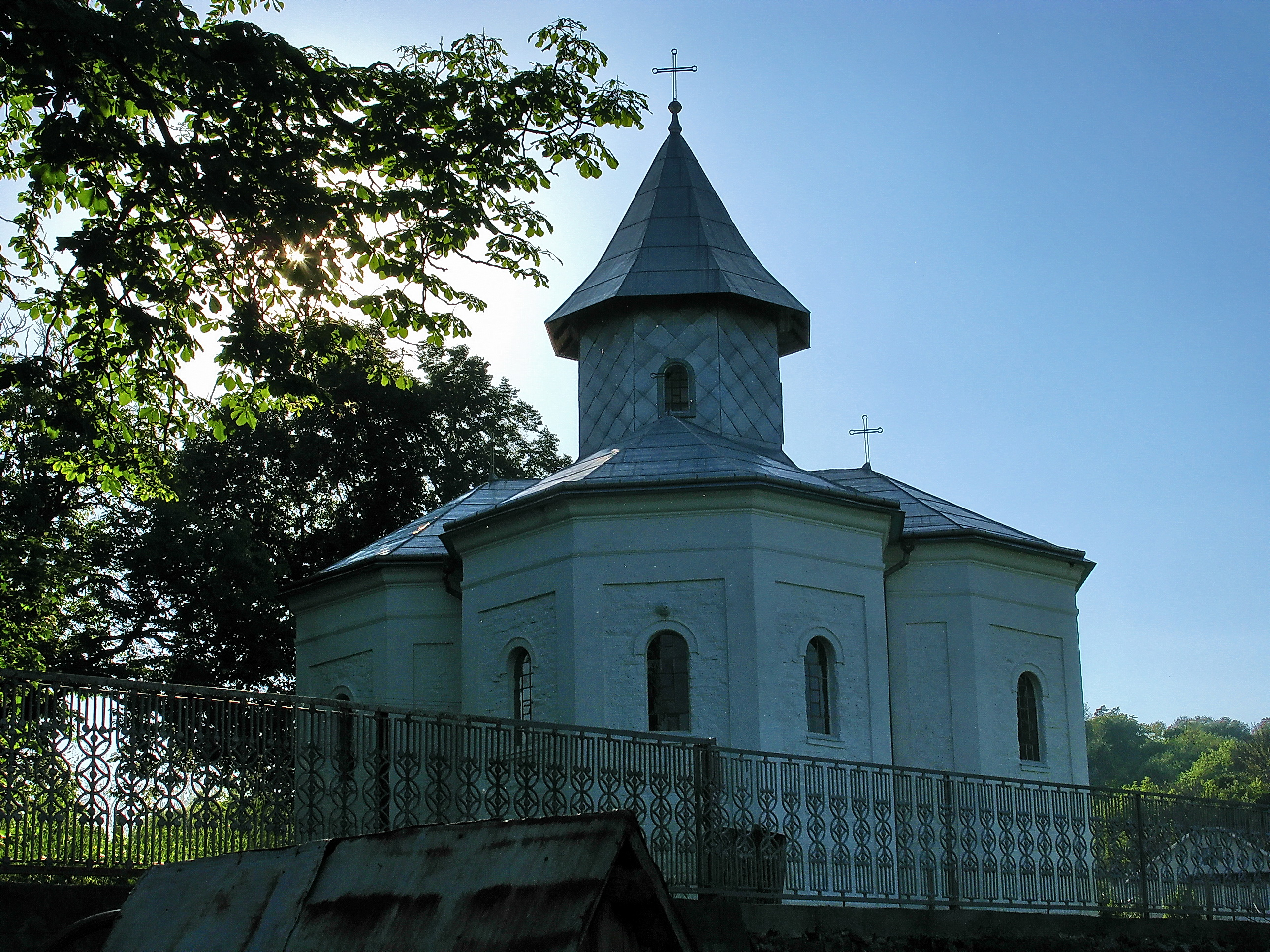 Церква (Воздвиження Хреста) (мур.), с. Онут